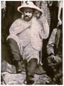 Ernest Choquin de Sarzec (1832–1901) francia diplomata, régész.